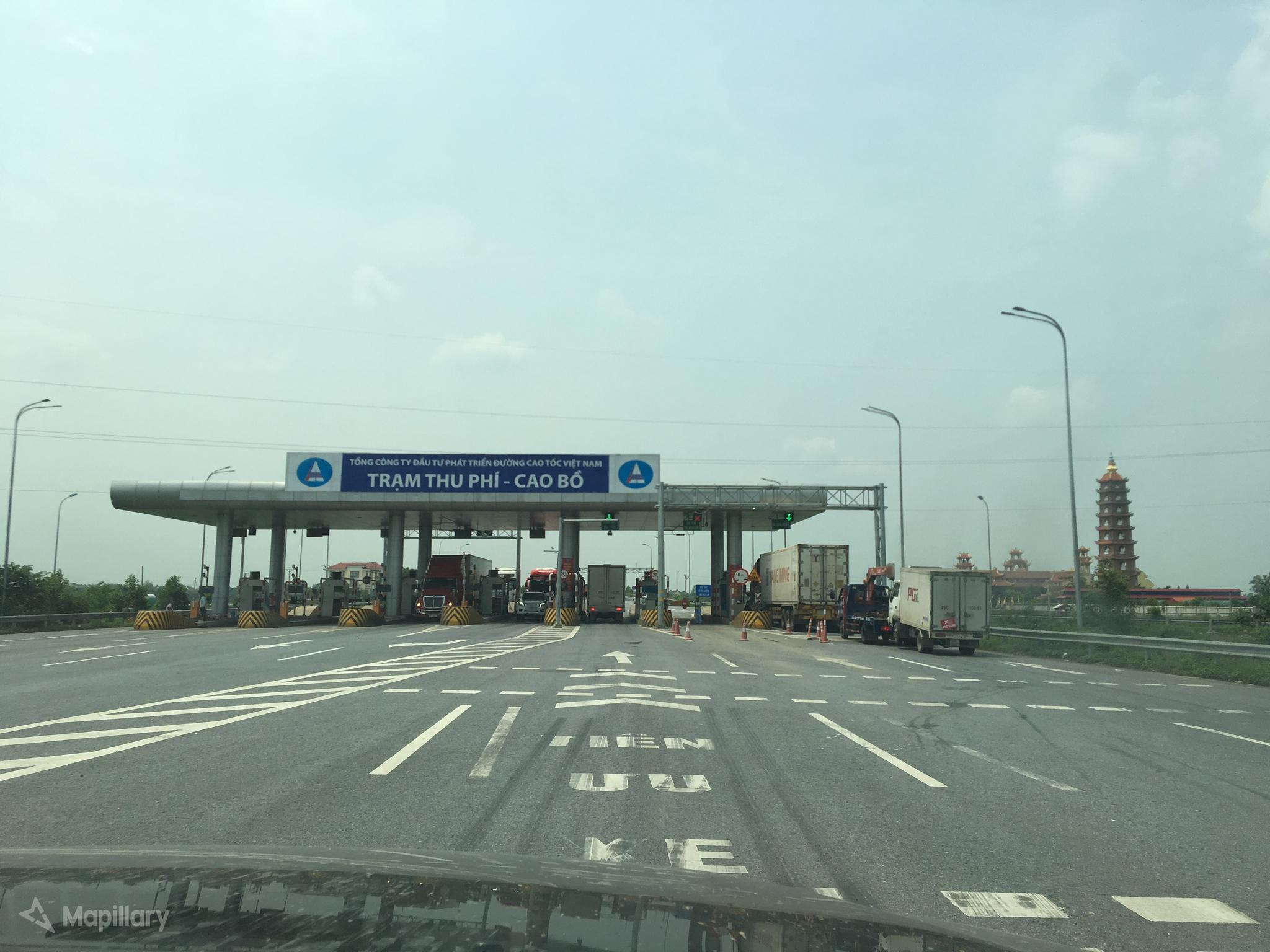 Trạm Thu Phí Cao Bồ